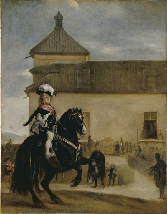 Velázquez: el príncep Baltasar Carles al picador. Còpia de l'original del duc de Westminster, ca. 1643. Londres, Wallace Collection